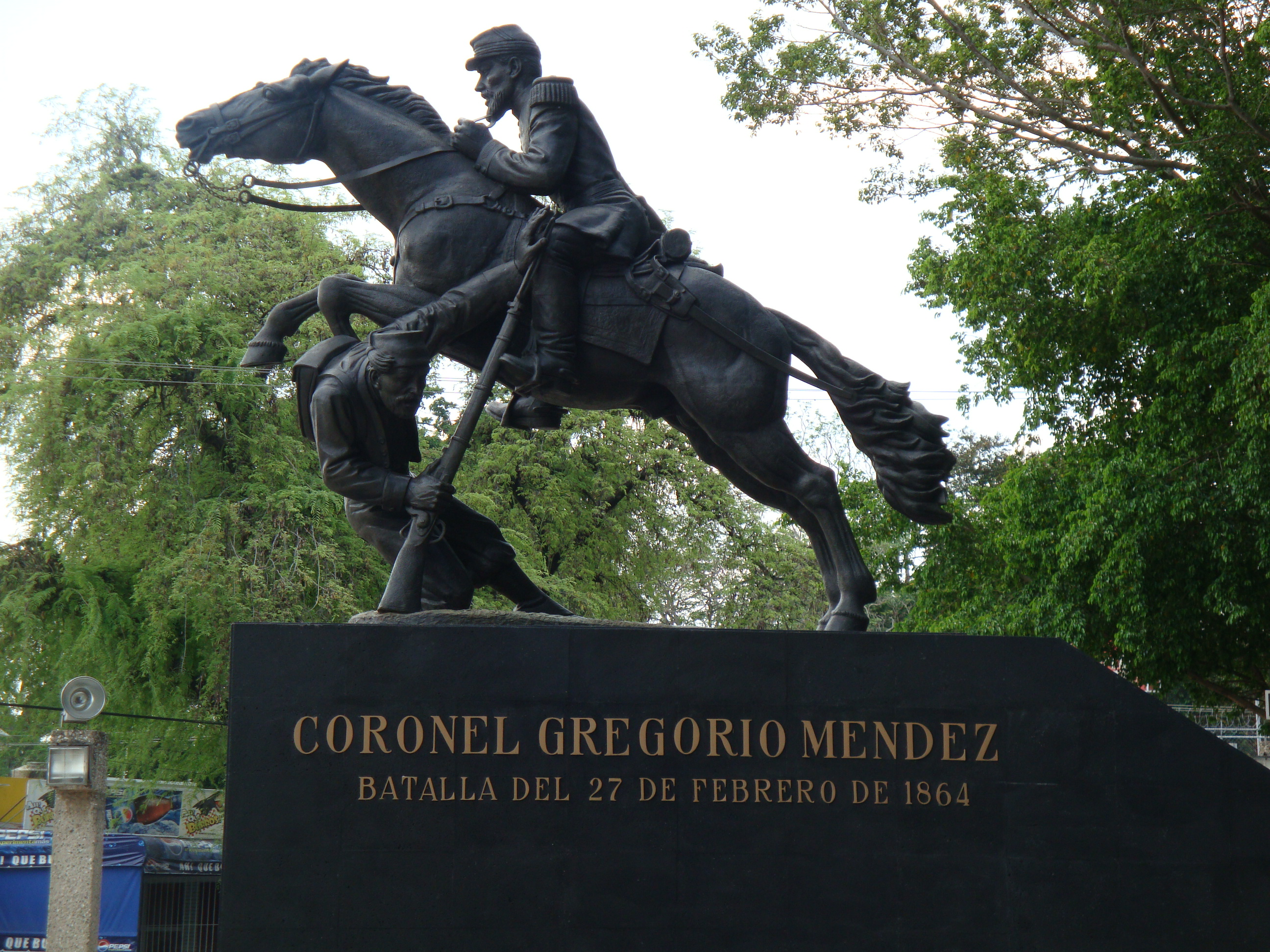 Monumento al coronel Gregorio Méndez Magaña, conocido popularmente como "el caballito", en la ciudad de Villahermosa, Tabasco, México.